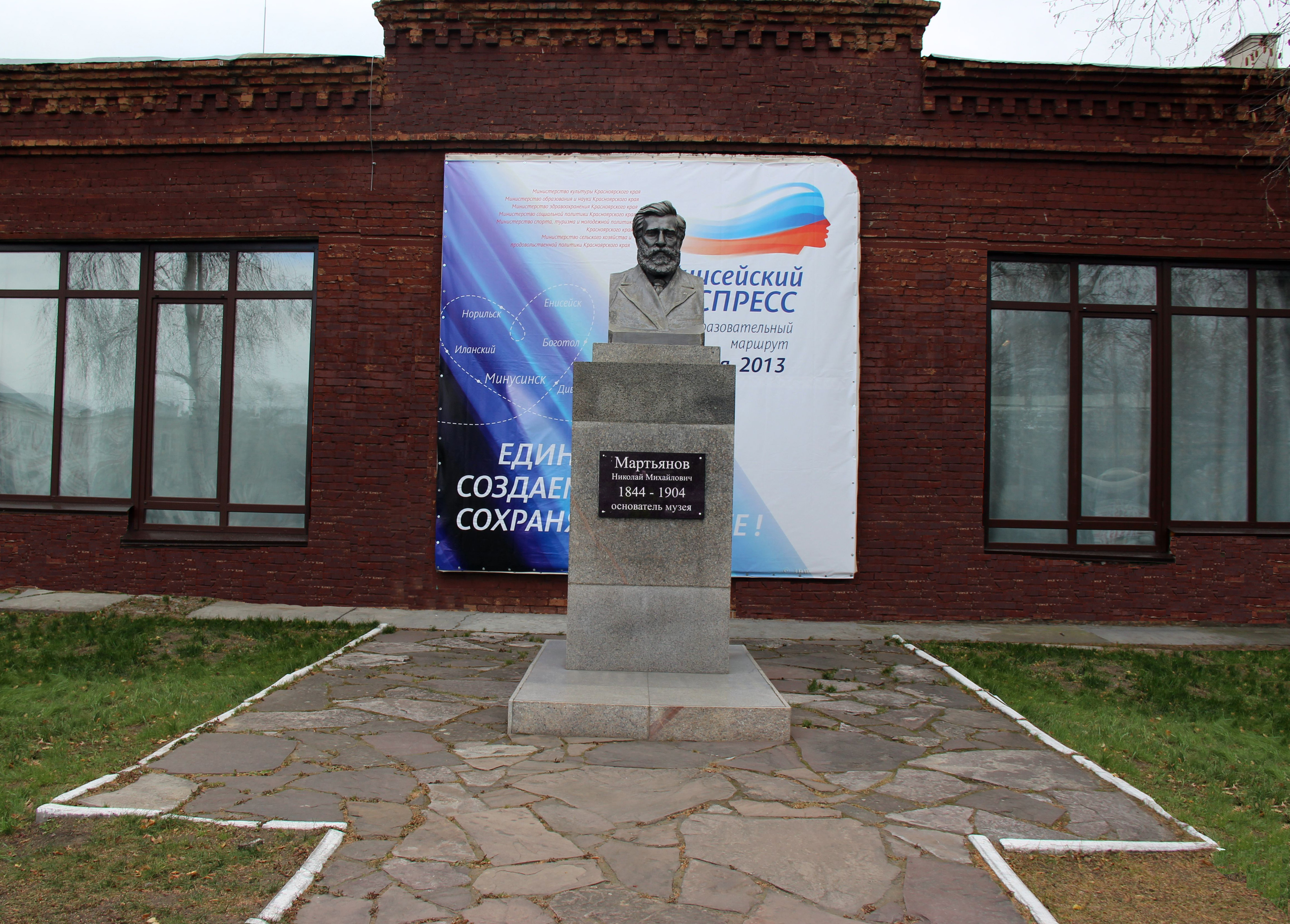 Н.М. Мартьянов (1844 -1904 гг.) - провизор, ученый-ботаник, основатель Минусинского местного публичного музея, Почётный гражданин г. Минусинска. Мартьяновым составлен гербарий более 1000 листов разновидностей высших растений, открыт 181 вид грибов, неизвестных ранее науке. Именем Мартьянова названы: музей и улица в г. Минусинске, речка и пик в Западном Саяне, более 20 видов высших и низших растений, ископаемых форм.